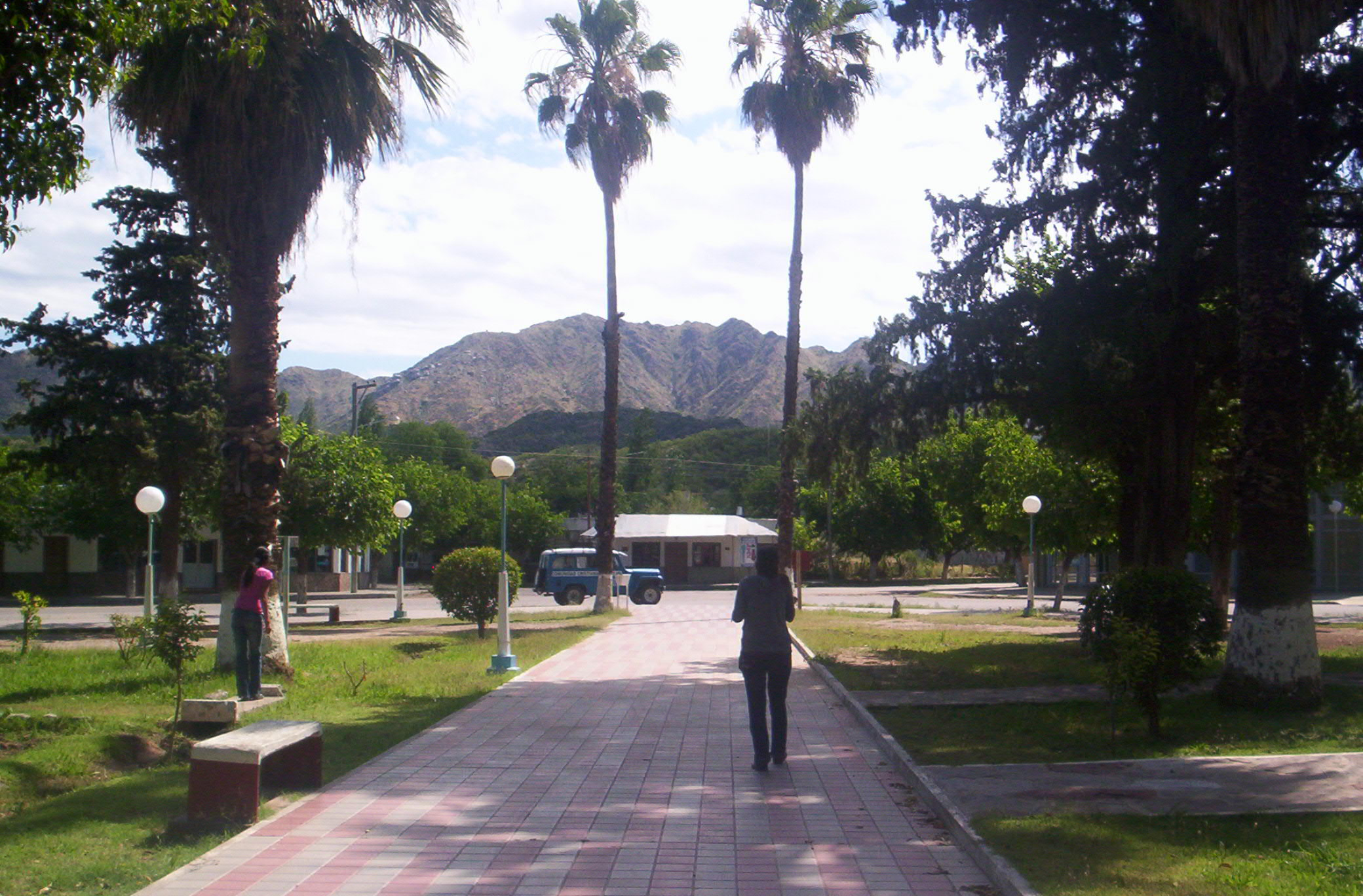 Plaza San Agustín en la localidad de San Agustin del Valle Fértil, provincia de San Juan